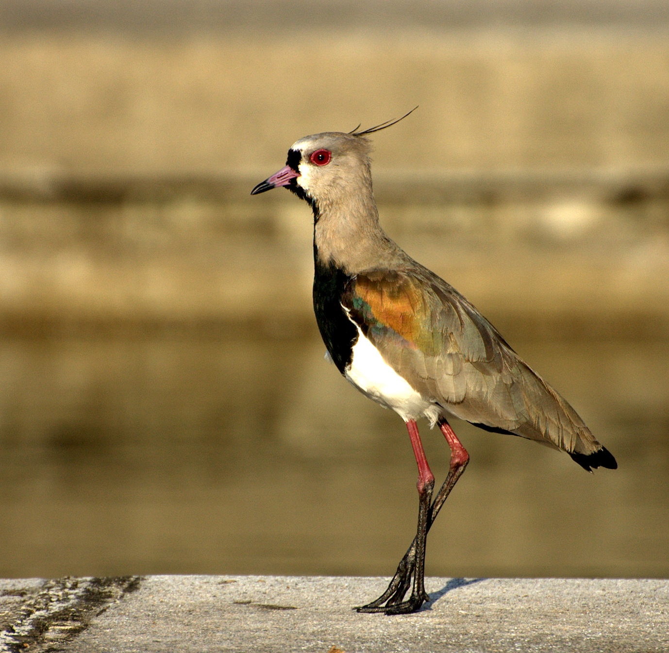 Parque da Independência, Museu do Ipiranga, São Paulo